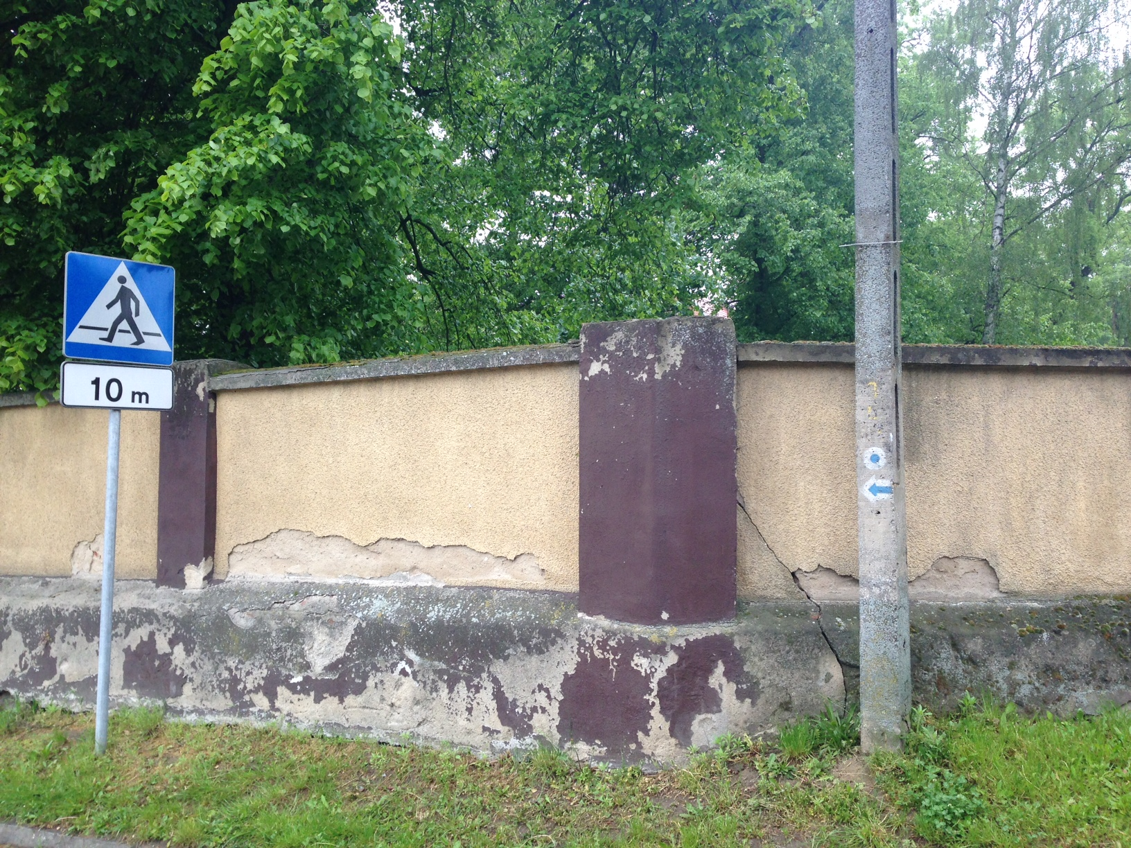 Szlak pieszy nr 3575 - koniec w Tulcach